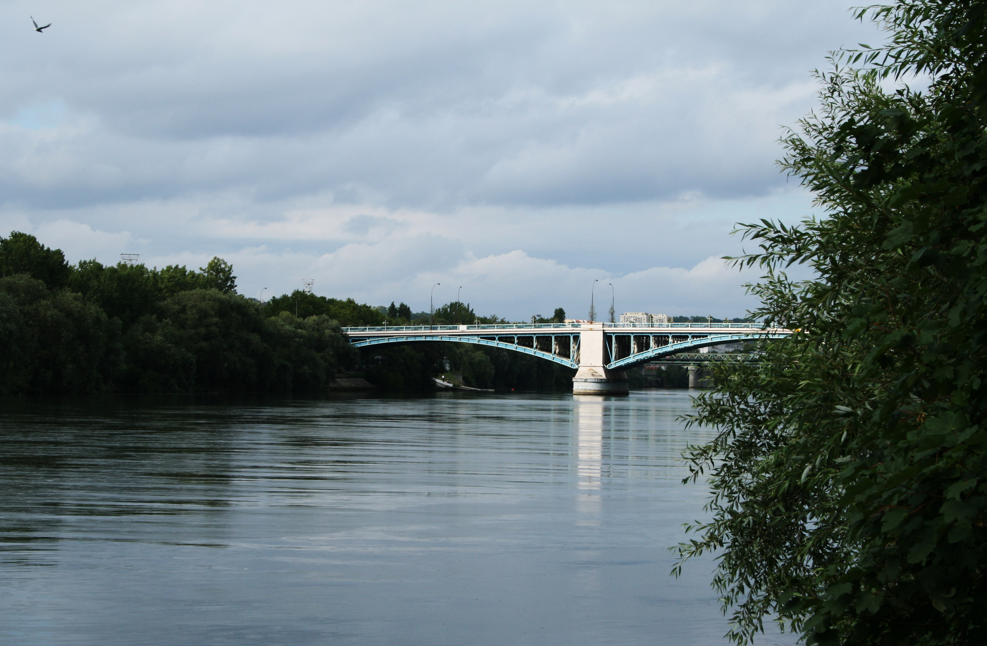 Pont d'Argenteuil